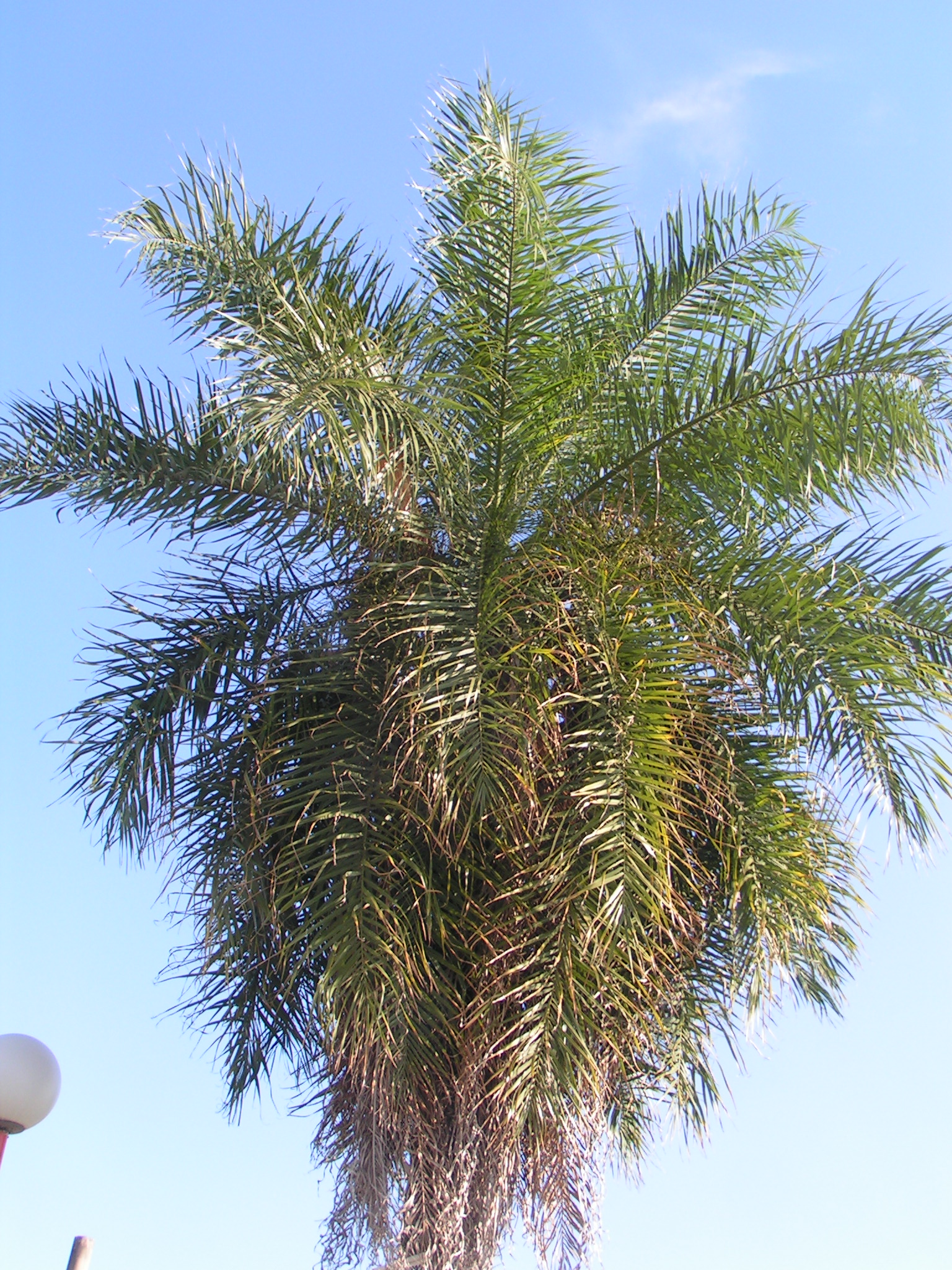 Mbokaja o mbocayá (Acrocomia aculeata, syn. A. totai)